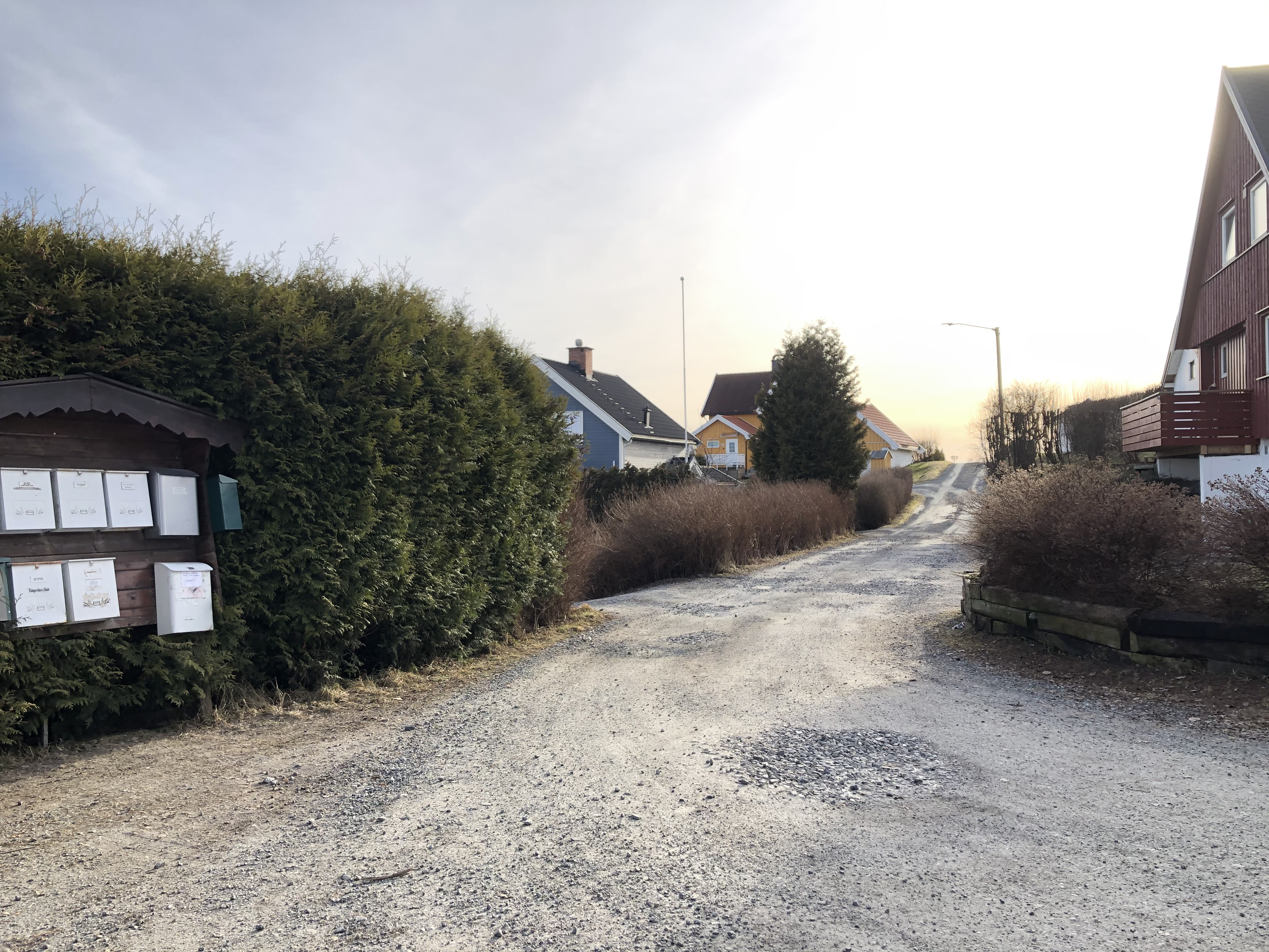 Kortveien, sett fra Lageshallveien, Hønefoss